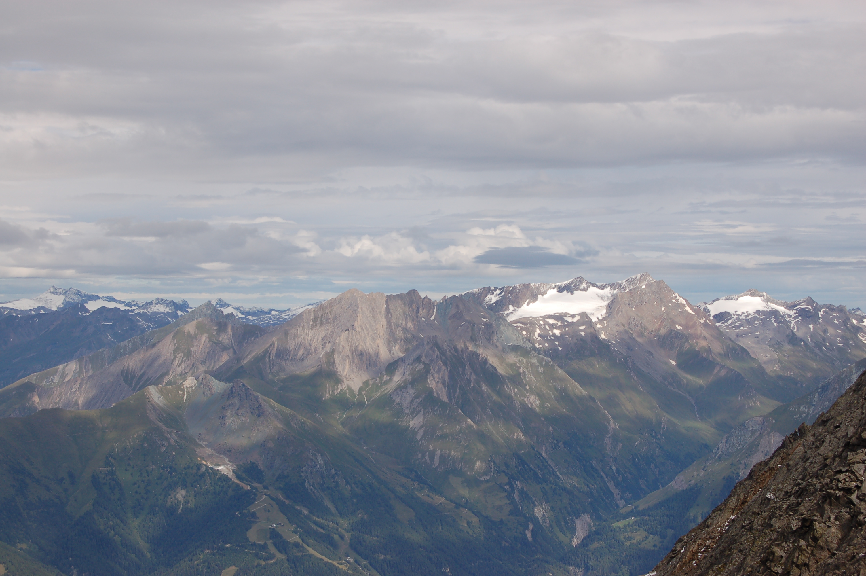 Blick vom Debantgrat auf die Granatspitzgruppe mit den Kendlspitzen, Großer Muntanitz und Luckenkogel. This file shows the National Park Hohe Tauern in Austria.